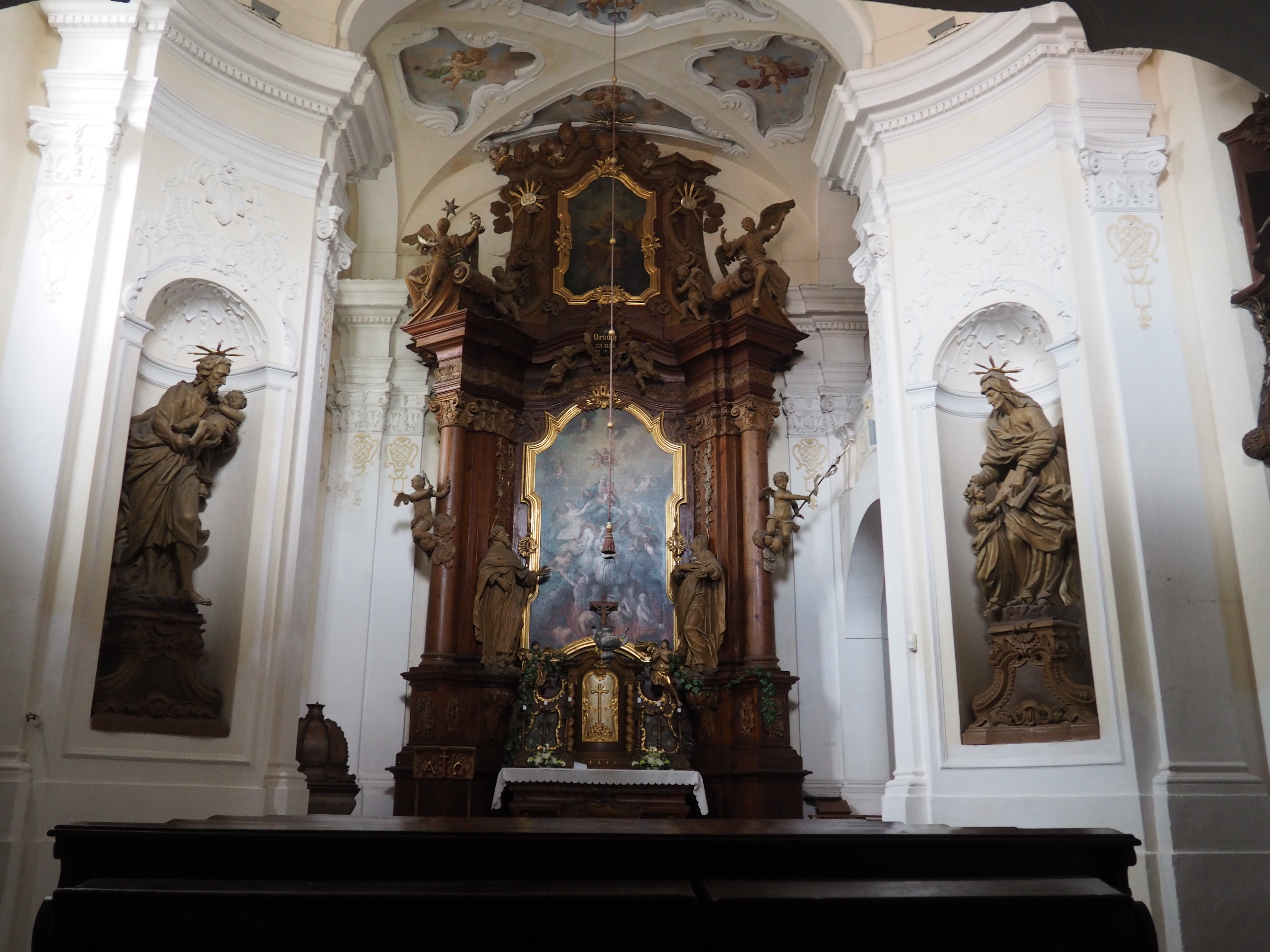 Pohled na oltář od dveří směrem na náměstí